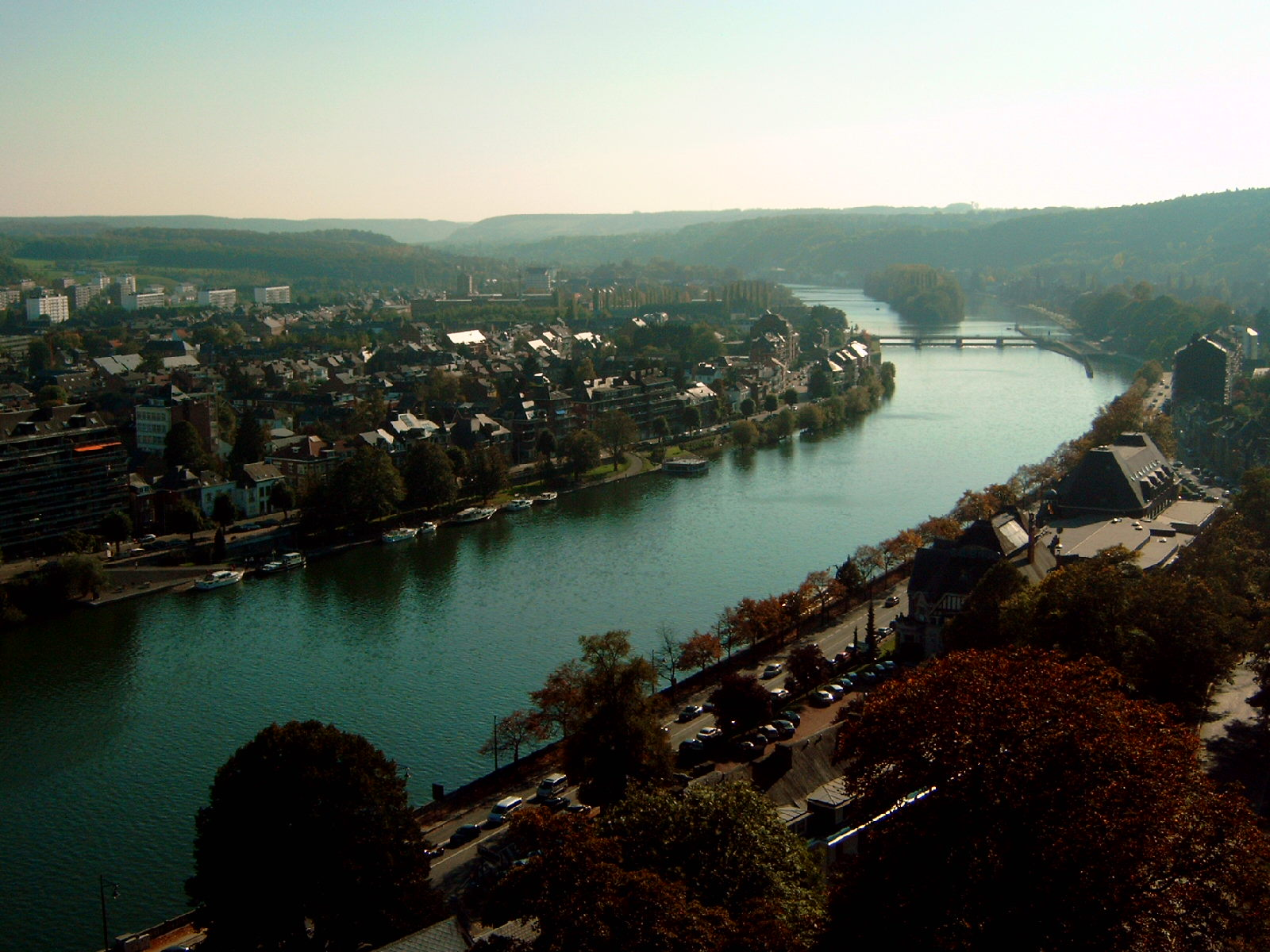 Jambes (links) aan de Maas, gezien in zuidelijke richting vanaf de Citadel van Namen. Eigen opname.